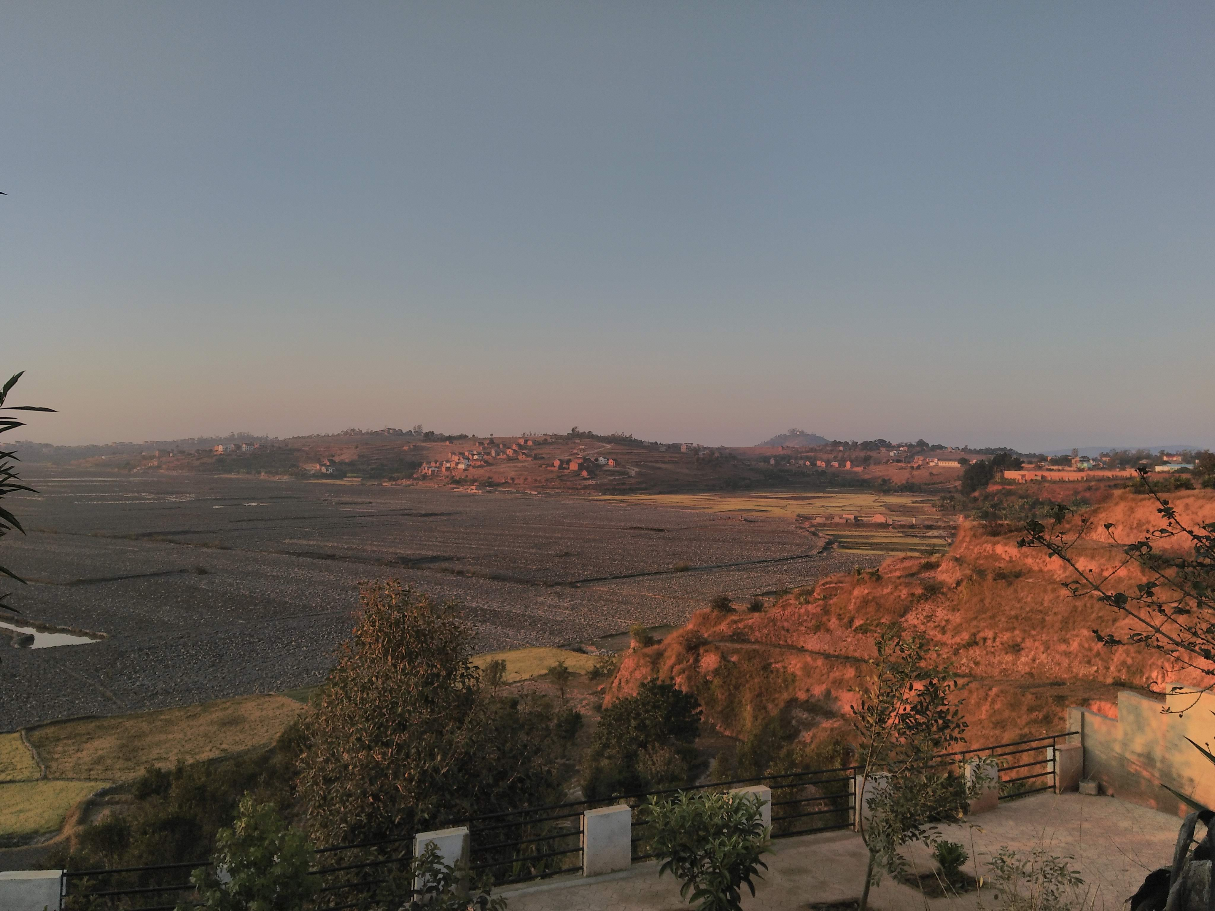 Photo prise depuis une terrasse privée avec vue sur des rizières de Madagascar, au nord-ouest de la province d'Antananarivo. La photo a été prise en hiver.